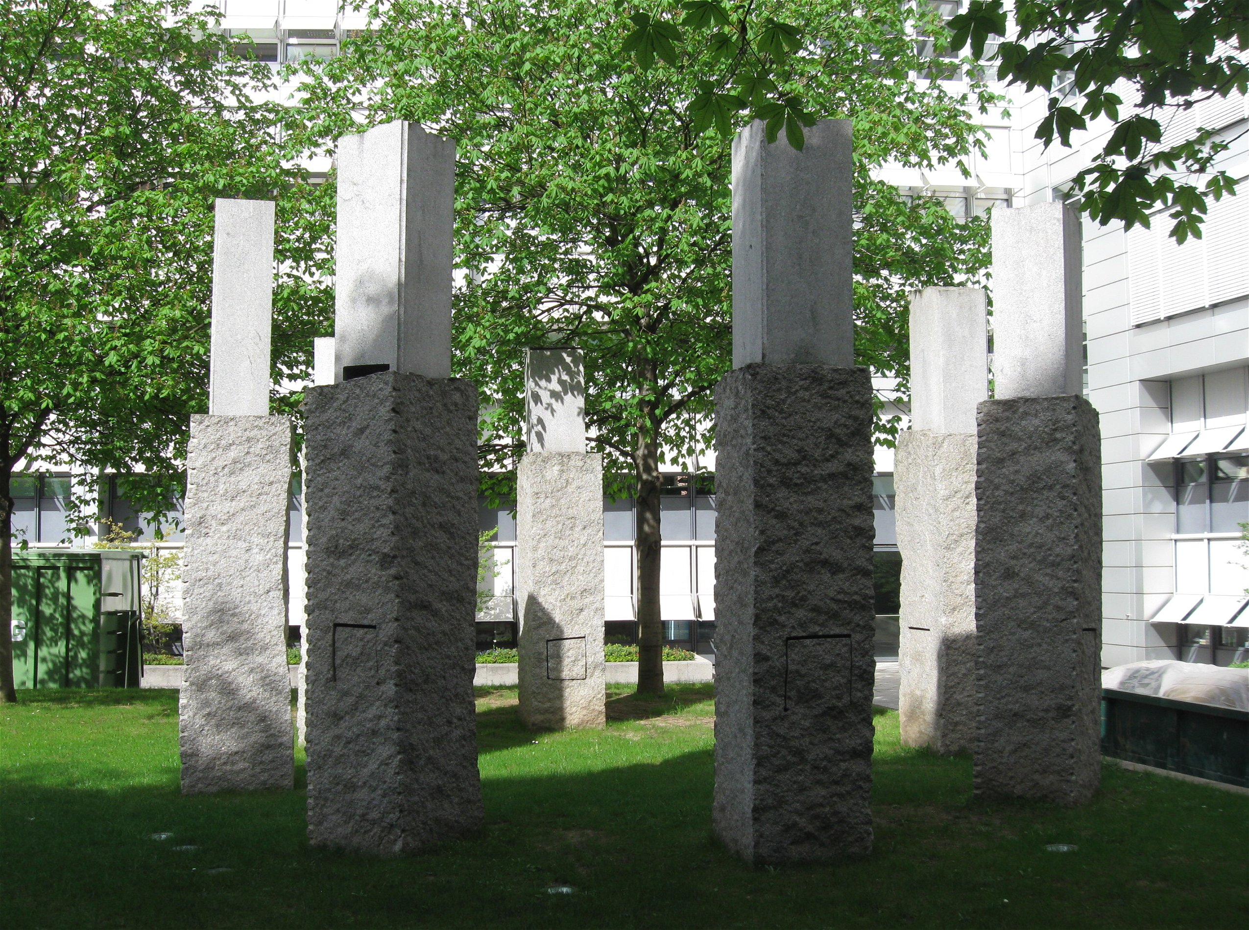 Nikolaus Gerhart: Geöffnete Granite II (1992), Europäisches Patentamt, Bayerstraße, München